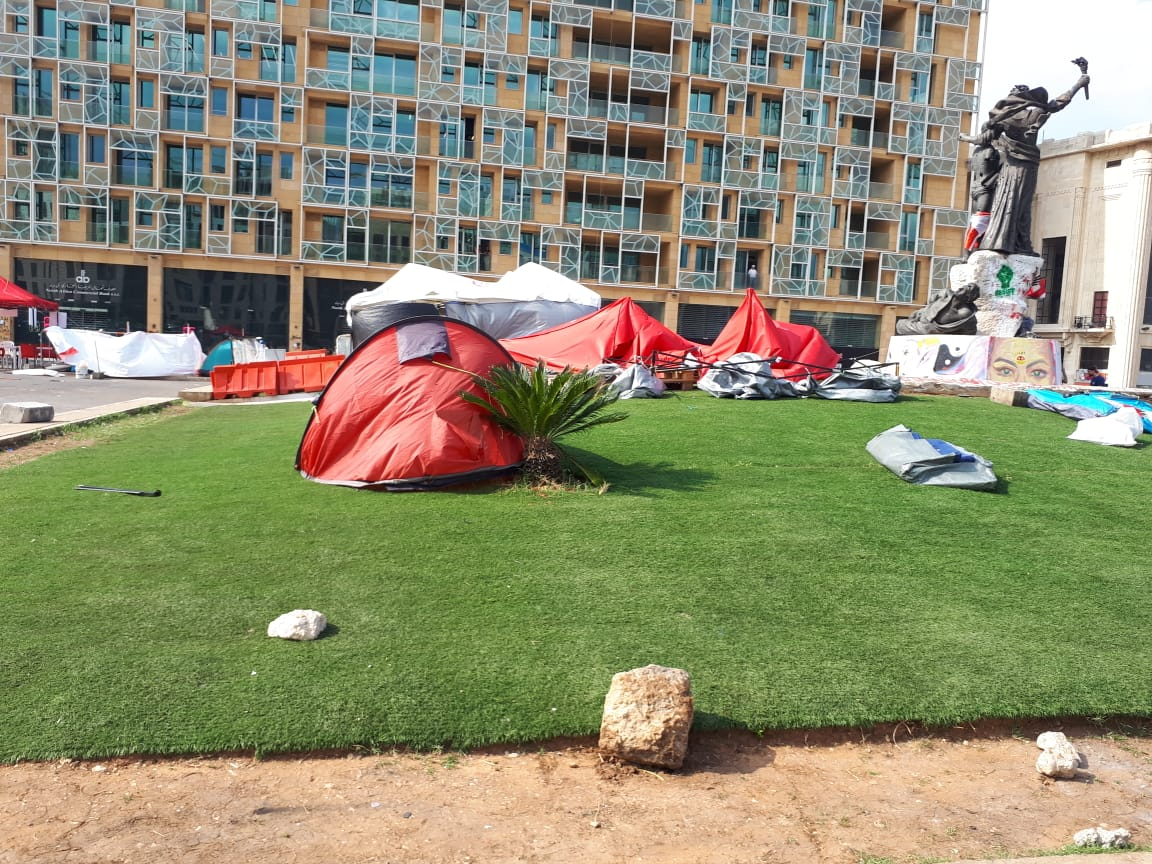 Zeltlager der Demonstranten auf dem Beiruter Märtyrerplatz November 2019